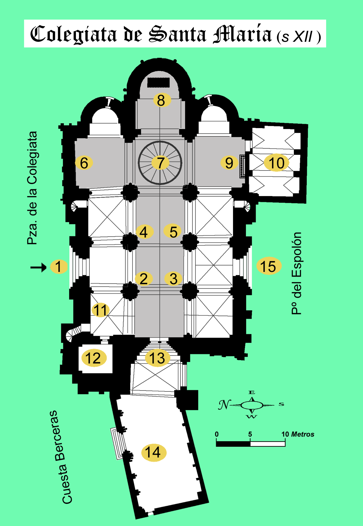 Planta, Colegiata de Santa María, Toro (Zamora), España, gótica (s XII)